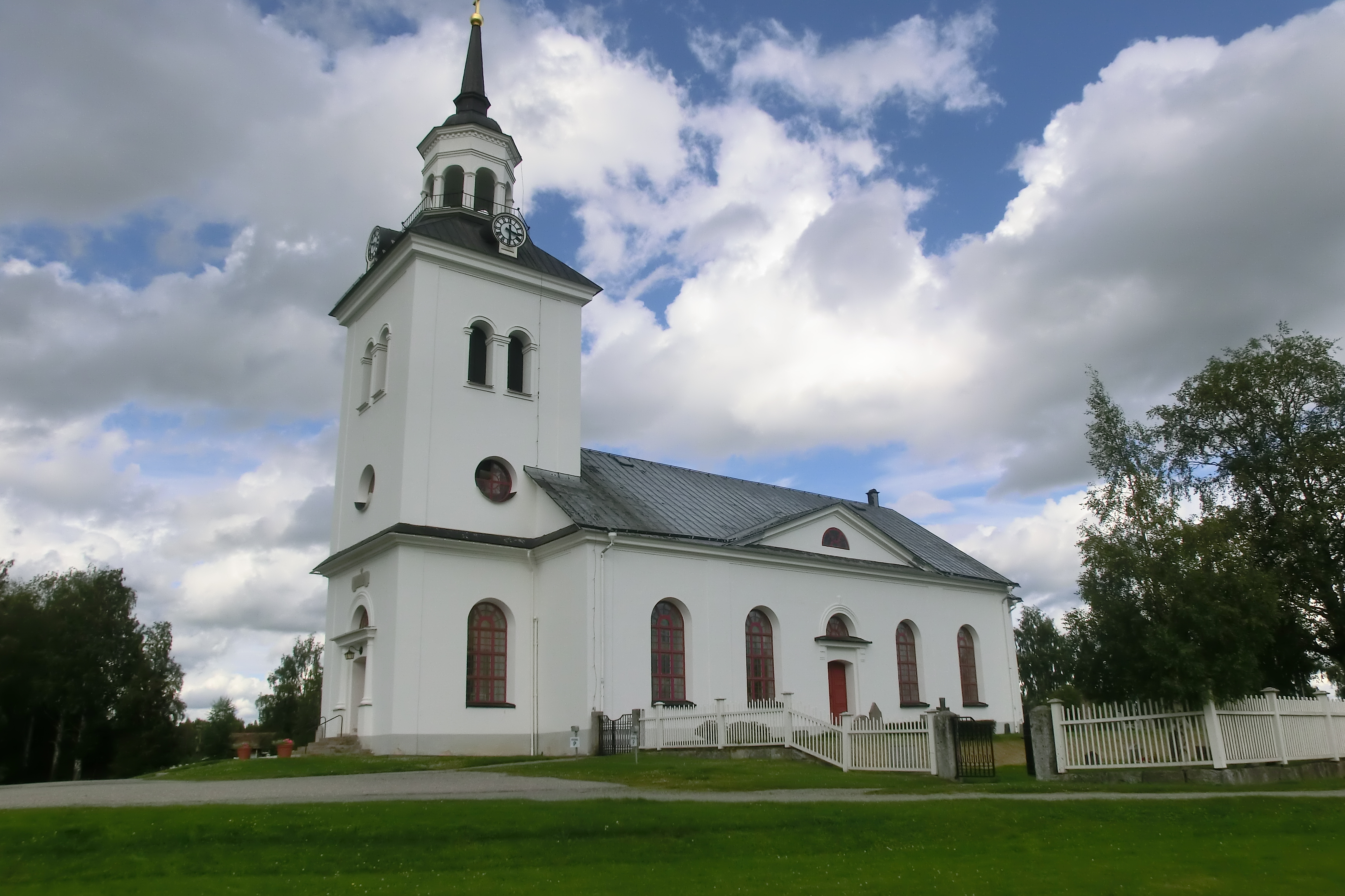 Haverö kyrka